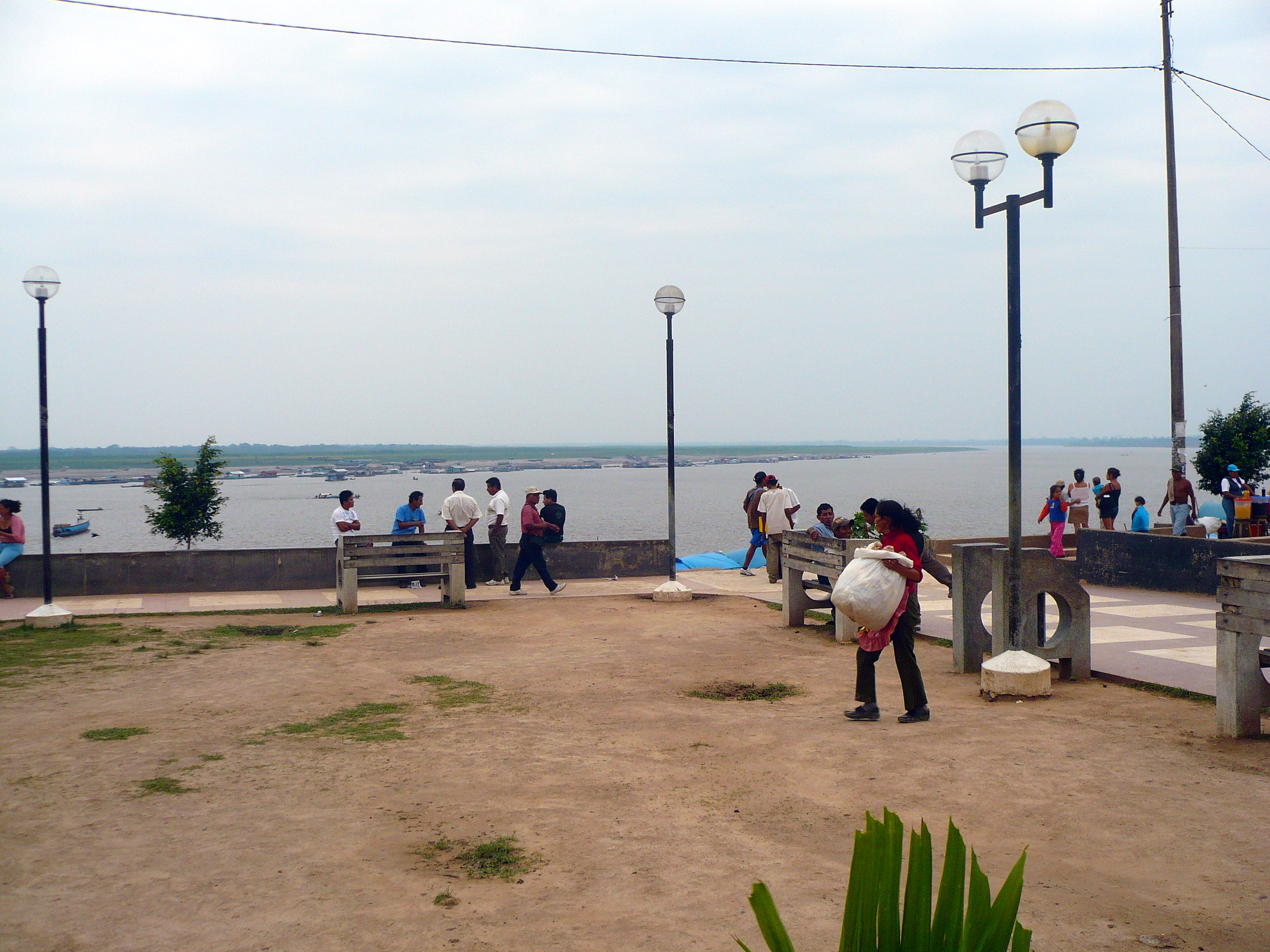 Parte de la Plaza Grau — observando al rio Ucayali a unos metros del Reloj Público de Pucallpa.